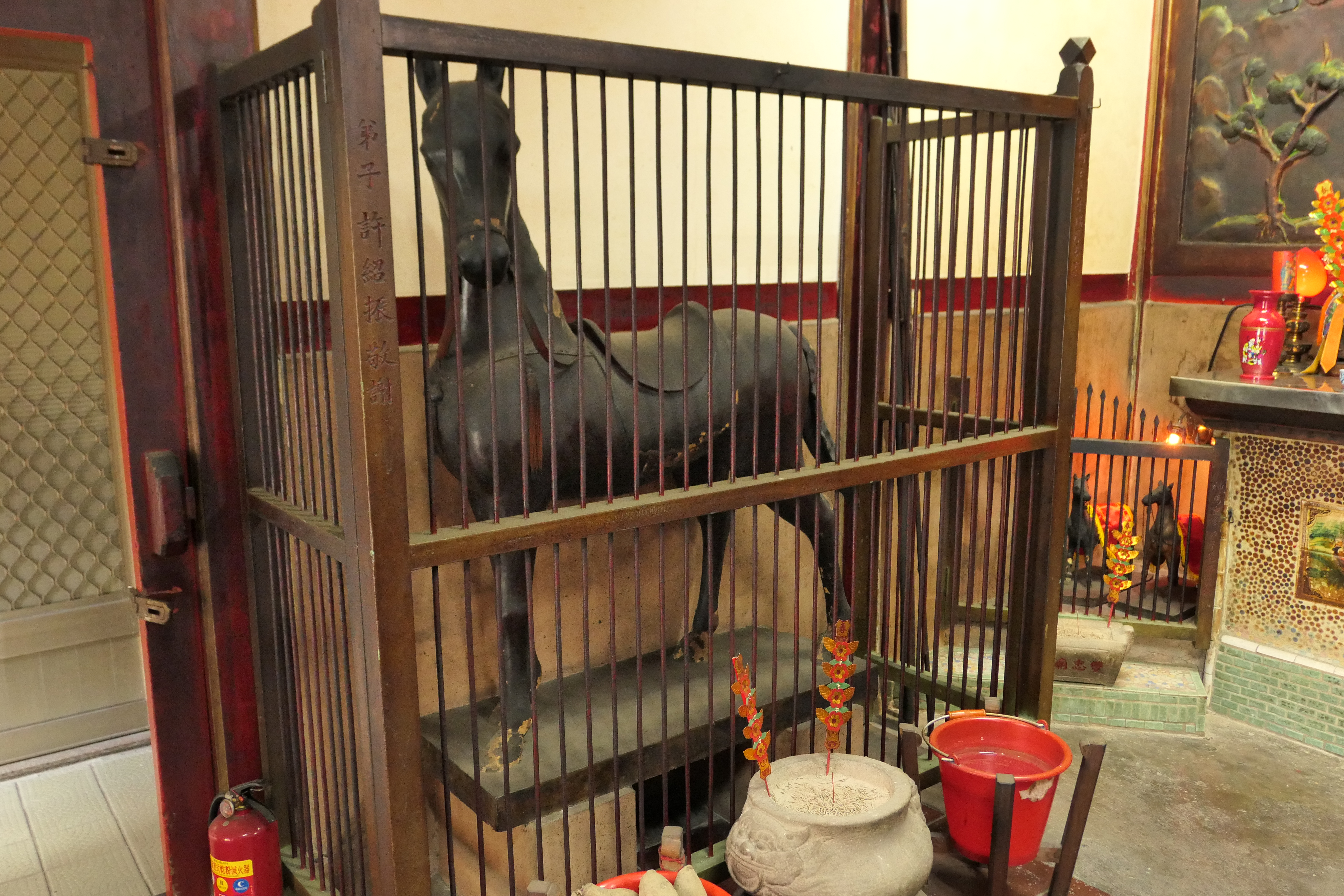 中文（台灣）: 嘉義雙忠廟神馬像